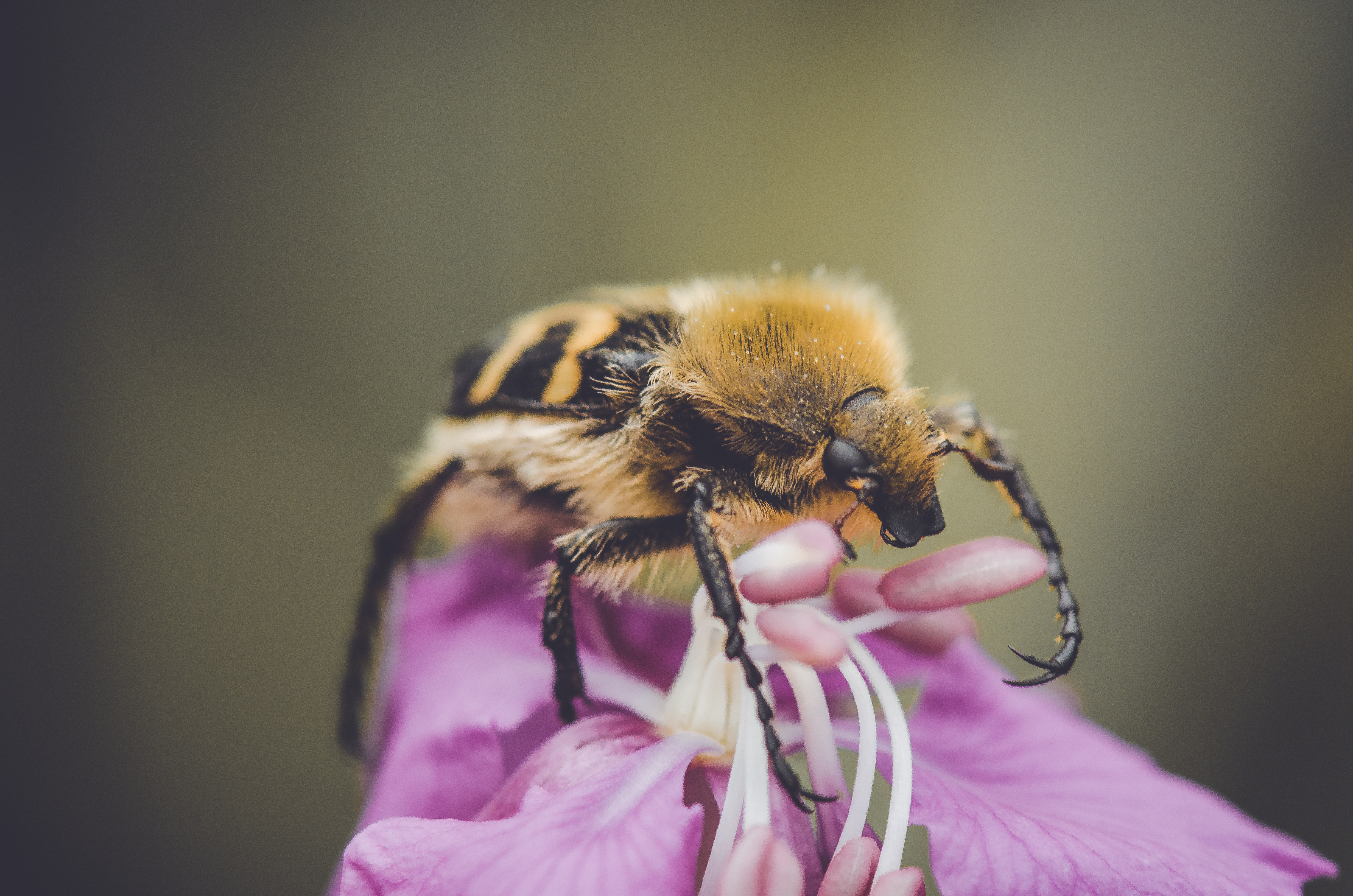 Humlebille fotografert på Østlandet